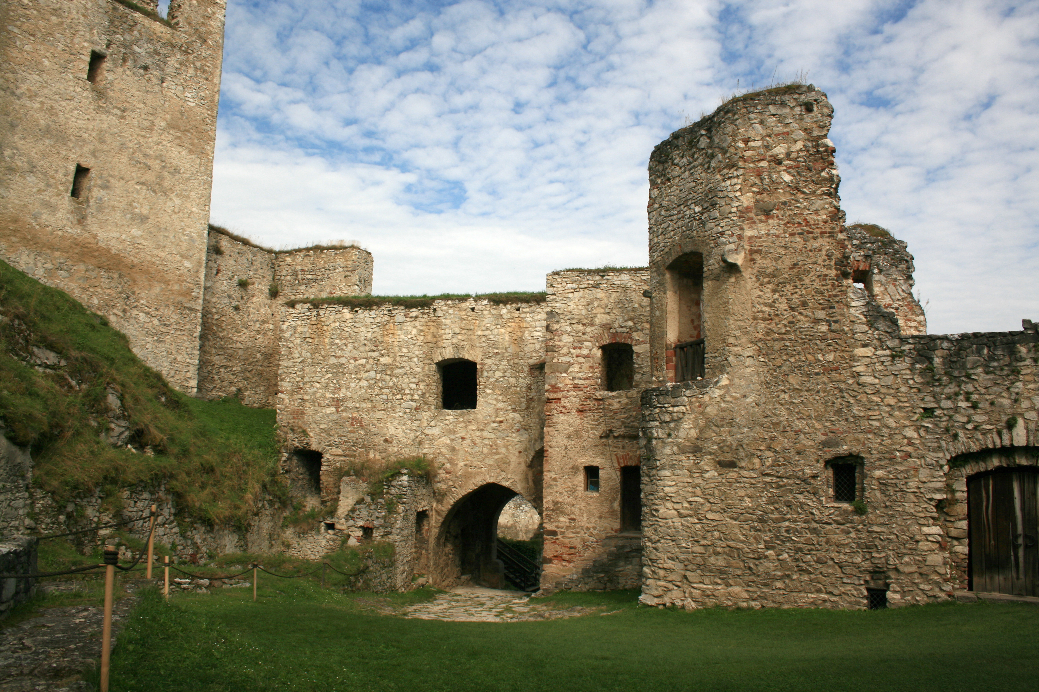 Hrad Rabí s hradním kostelem Nejsvětější Trojice, část stojící, část zřícenina a archeologické stopy (Rabí), na skalnatém výchozu kopce, Rabí